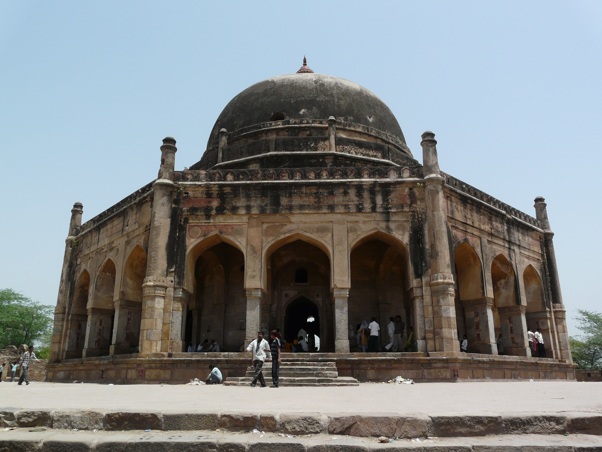 Adham Khan tomb, Mehrauli, Delhi